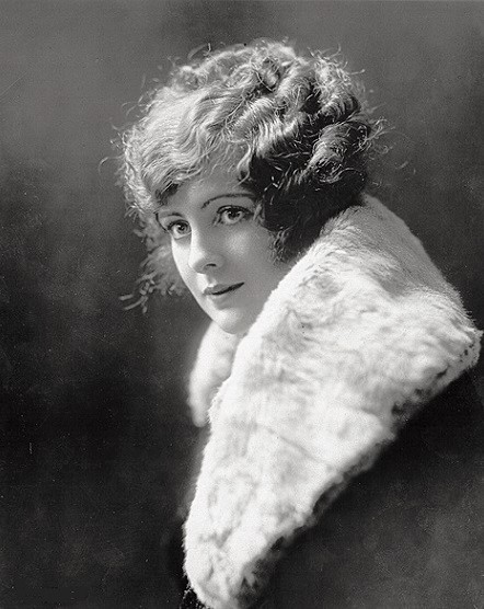 Billie Dove